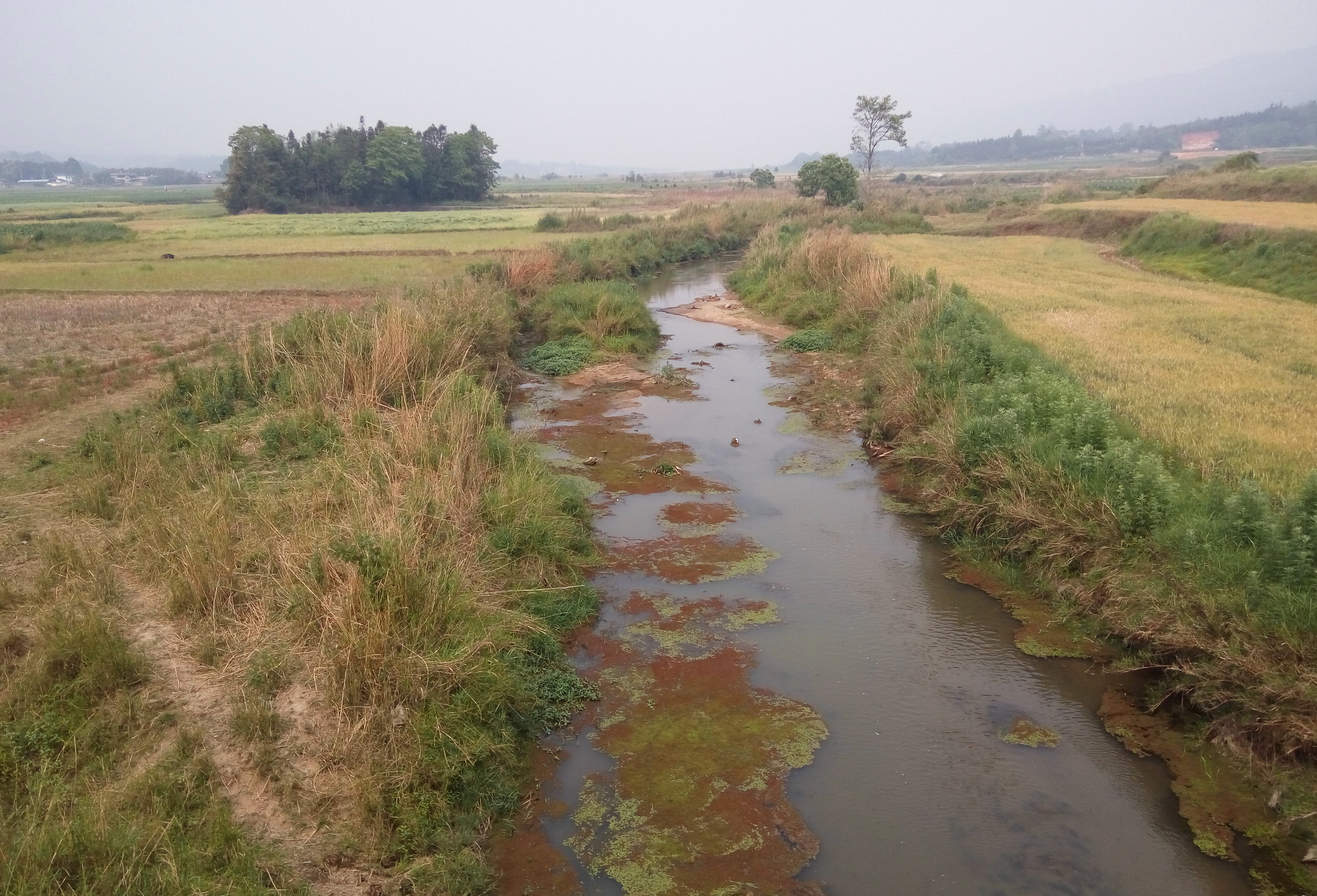 中国云南省德宏州陇川县境内的户撒河，为大盈江支流，属于伊洛瓦底江水系。